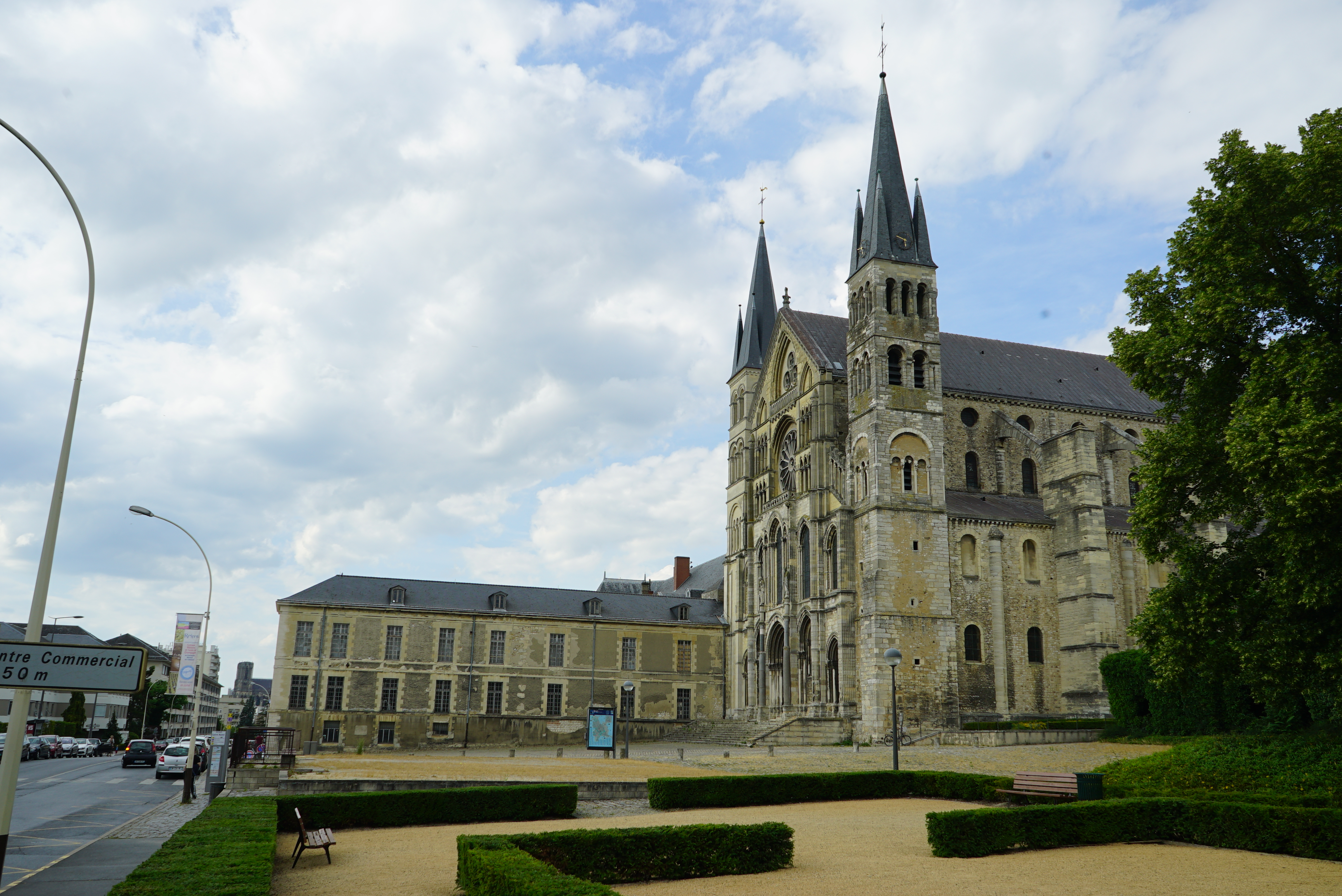 une vue de la rue Simon.